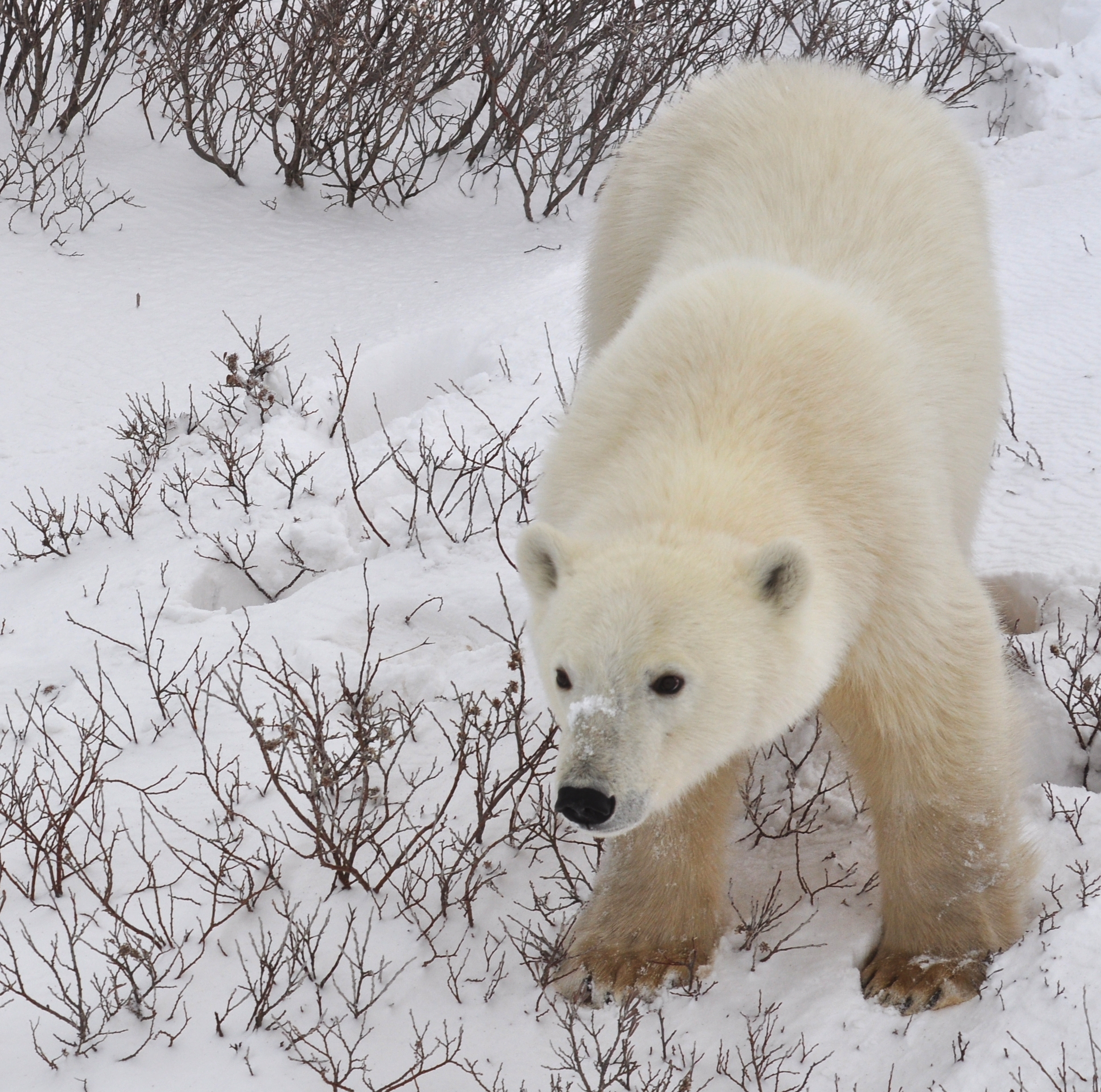 Taken by M.M.